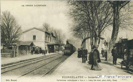 Ancienne carte postale de la gare de Pierrelatte